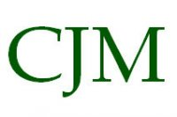 CJM Logo